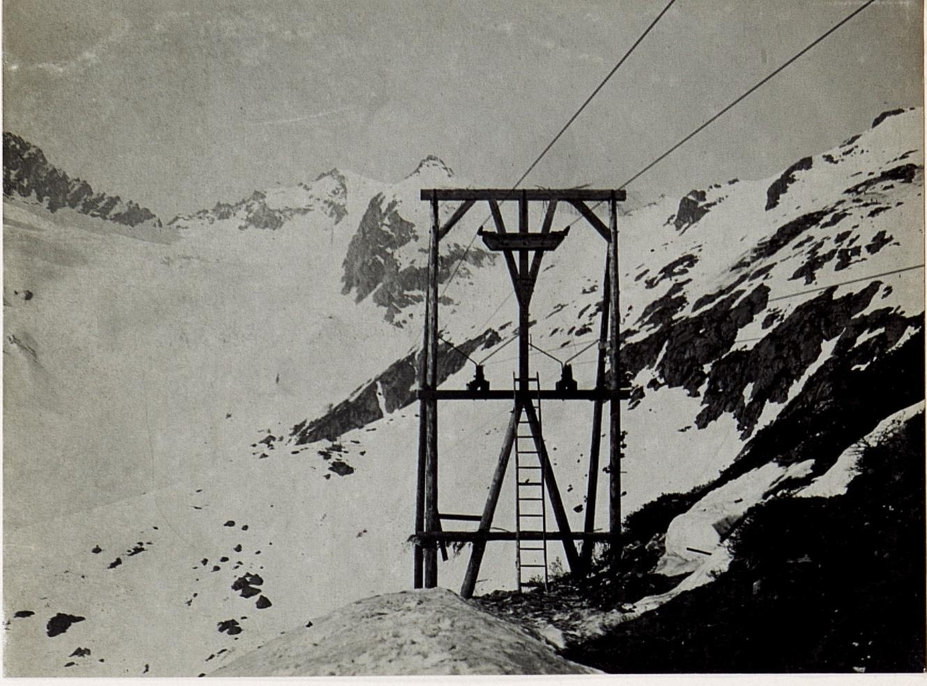 Presenalseilbahn, im Hintergrund Presenaspitze, Steinhardspitze, Maroccaro.